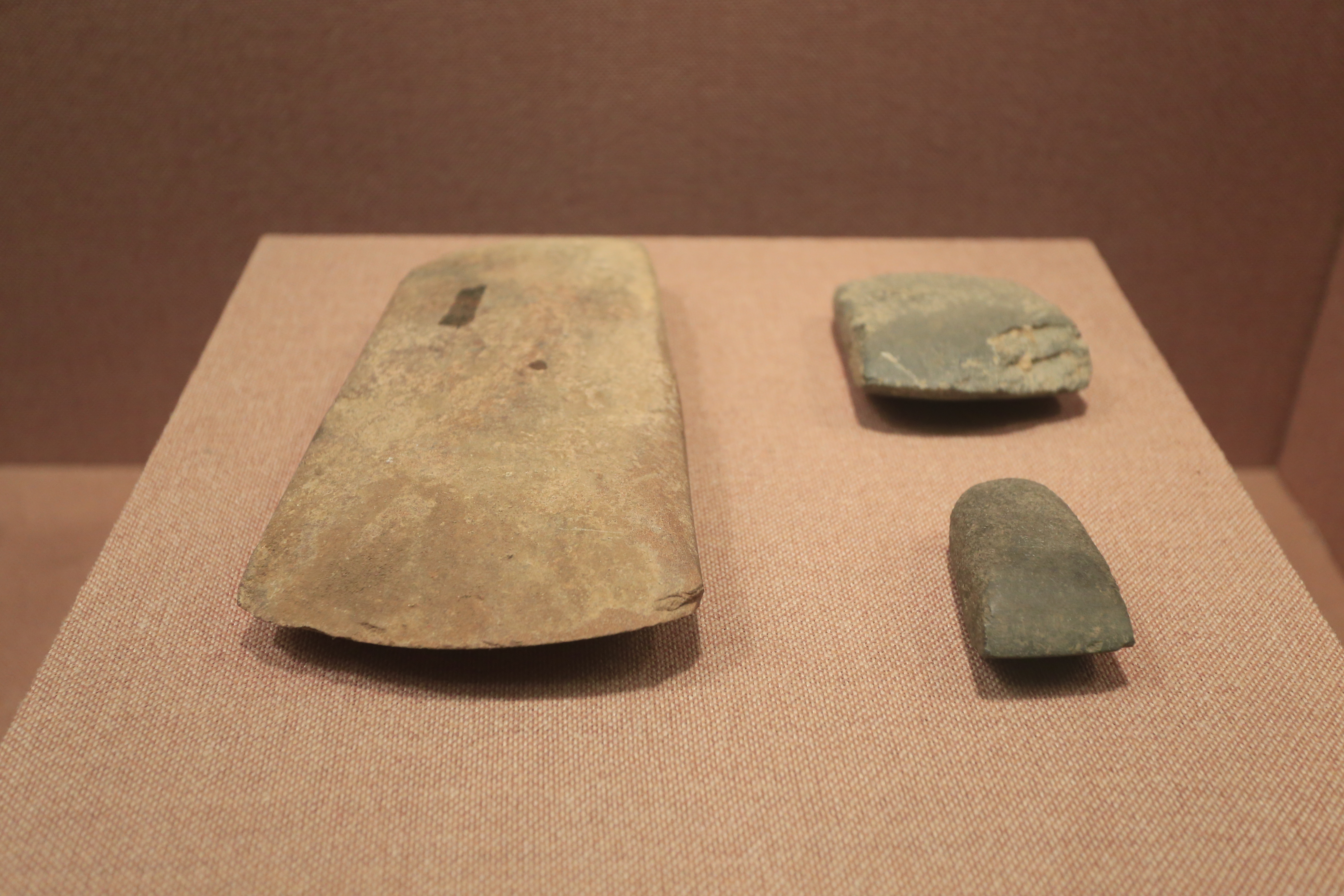 襄阳市博物馆藏新石器时代石斧，1980年枣阳雕龙碑遗址出土